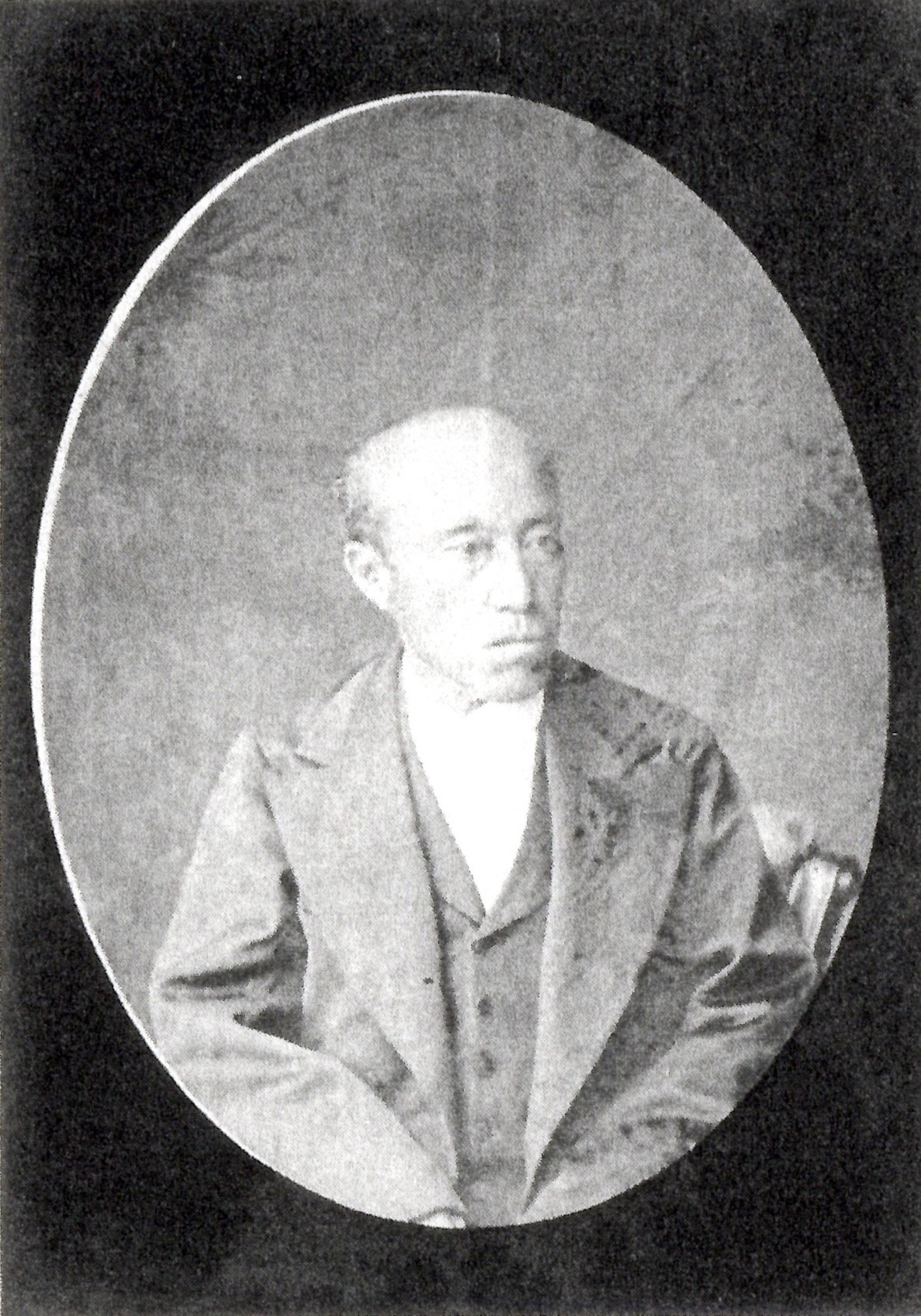 水野忠順の肖像写真。